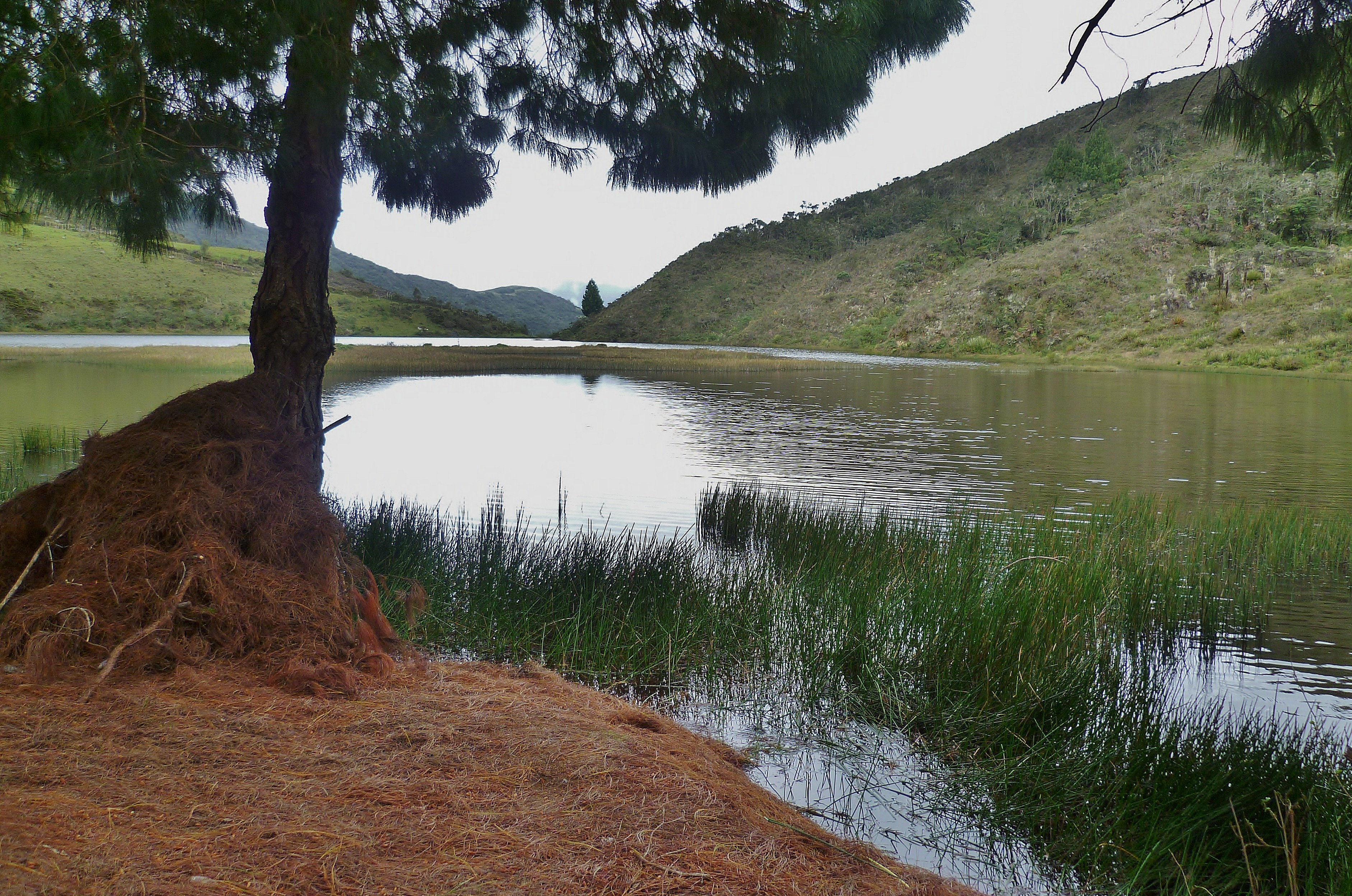 Esta fotografía fue tomada en el municipio colombiano con código 54125.